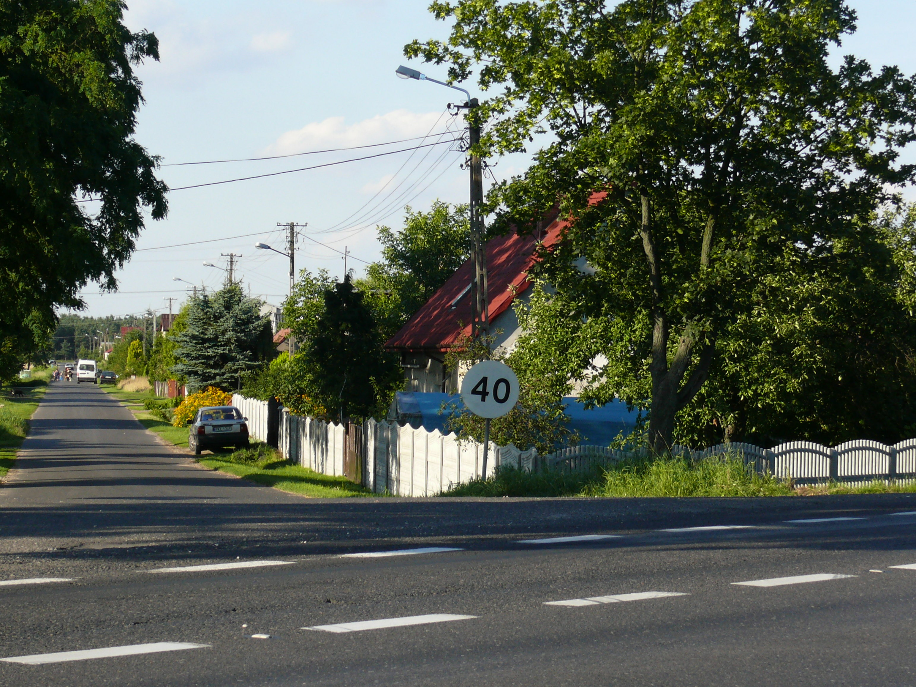 Miejscowość Mariampol